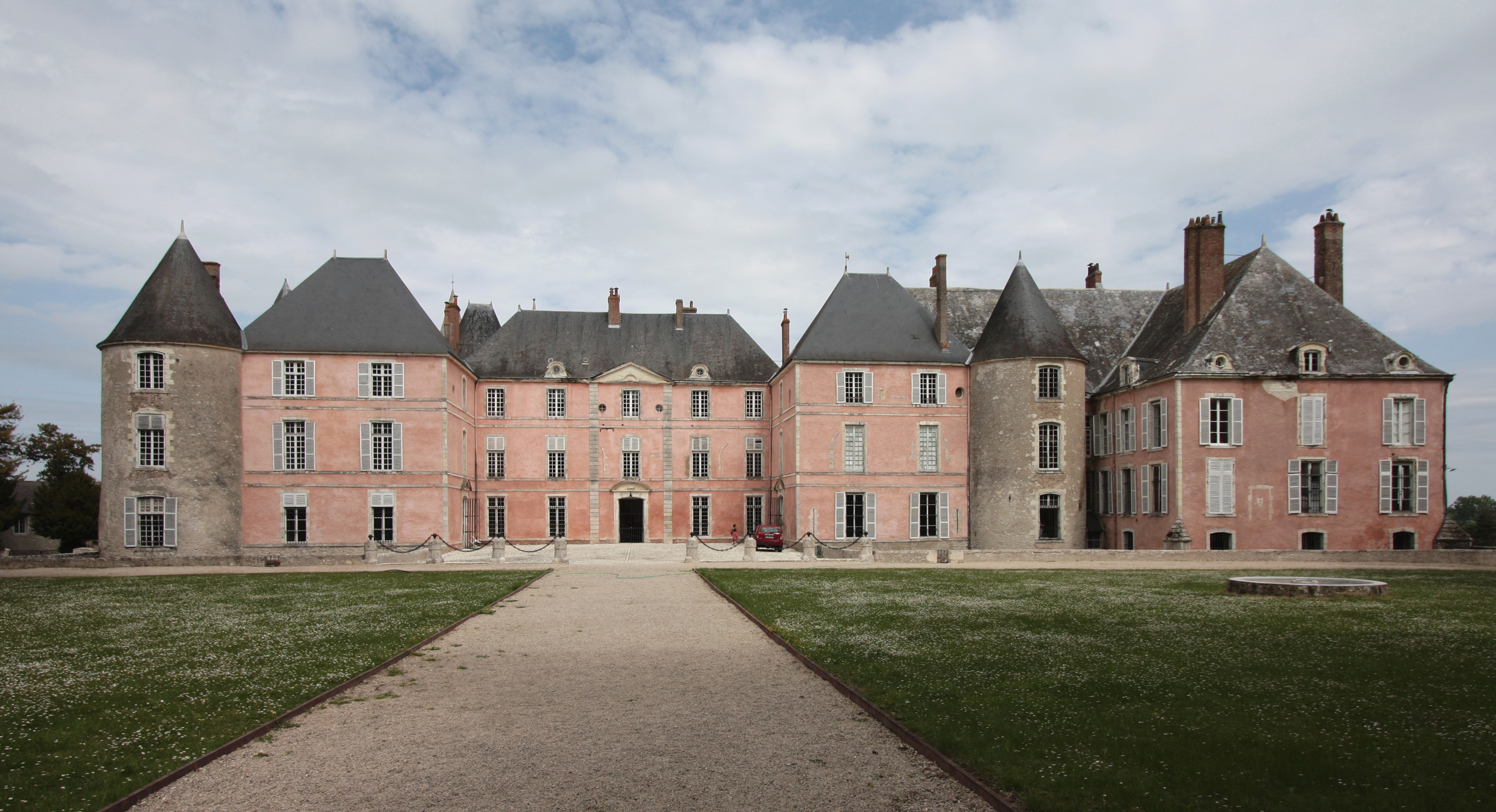 Schloss Meung-sur-Loire, Département Loiret/Frankreich - Parkfront